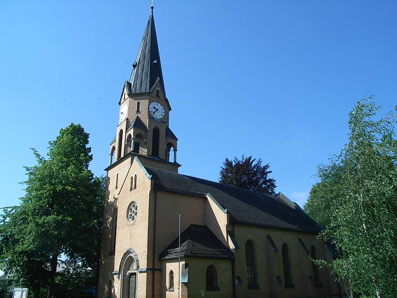 Evangelische Pfarrkirche, Zwiesel